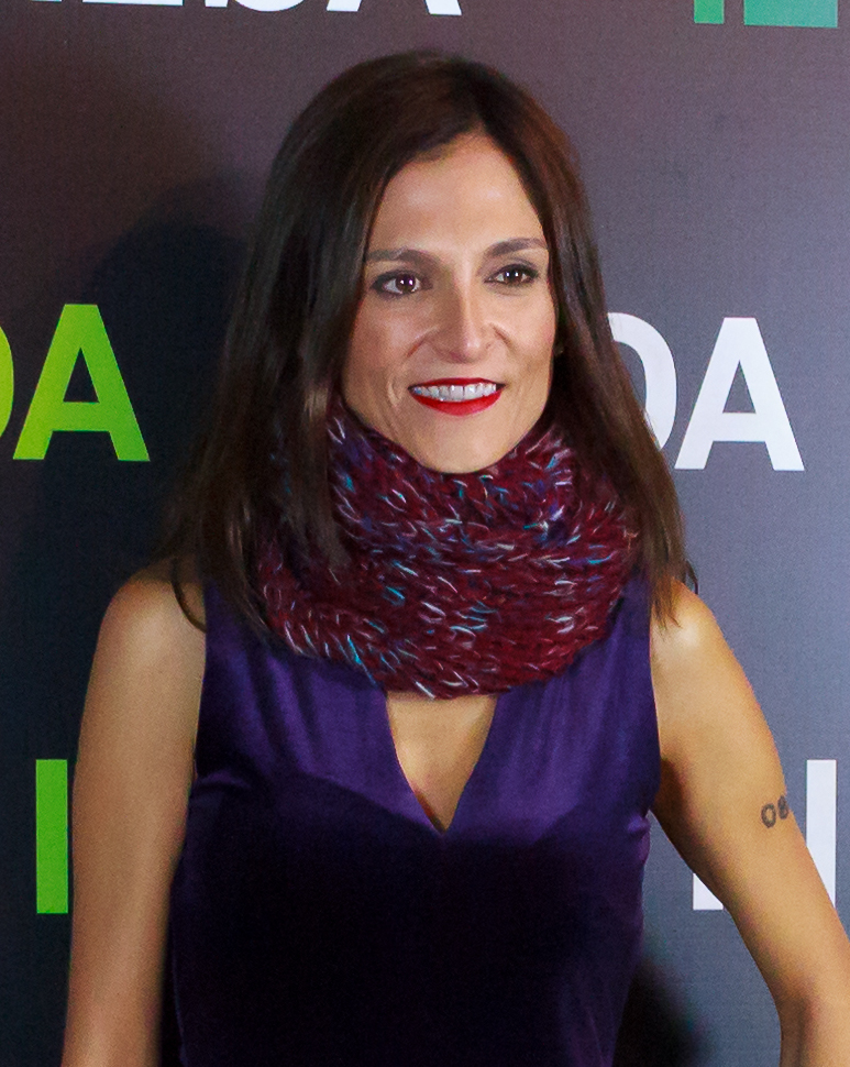 Isabel Moreira nos Prémios Arco-Íris, em Janeiro de 2019.